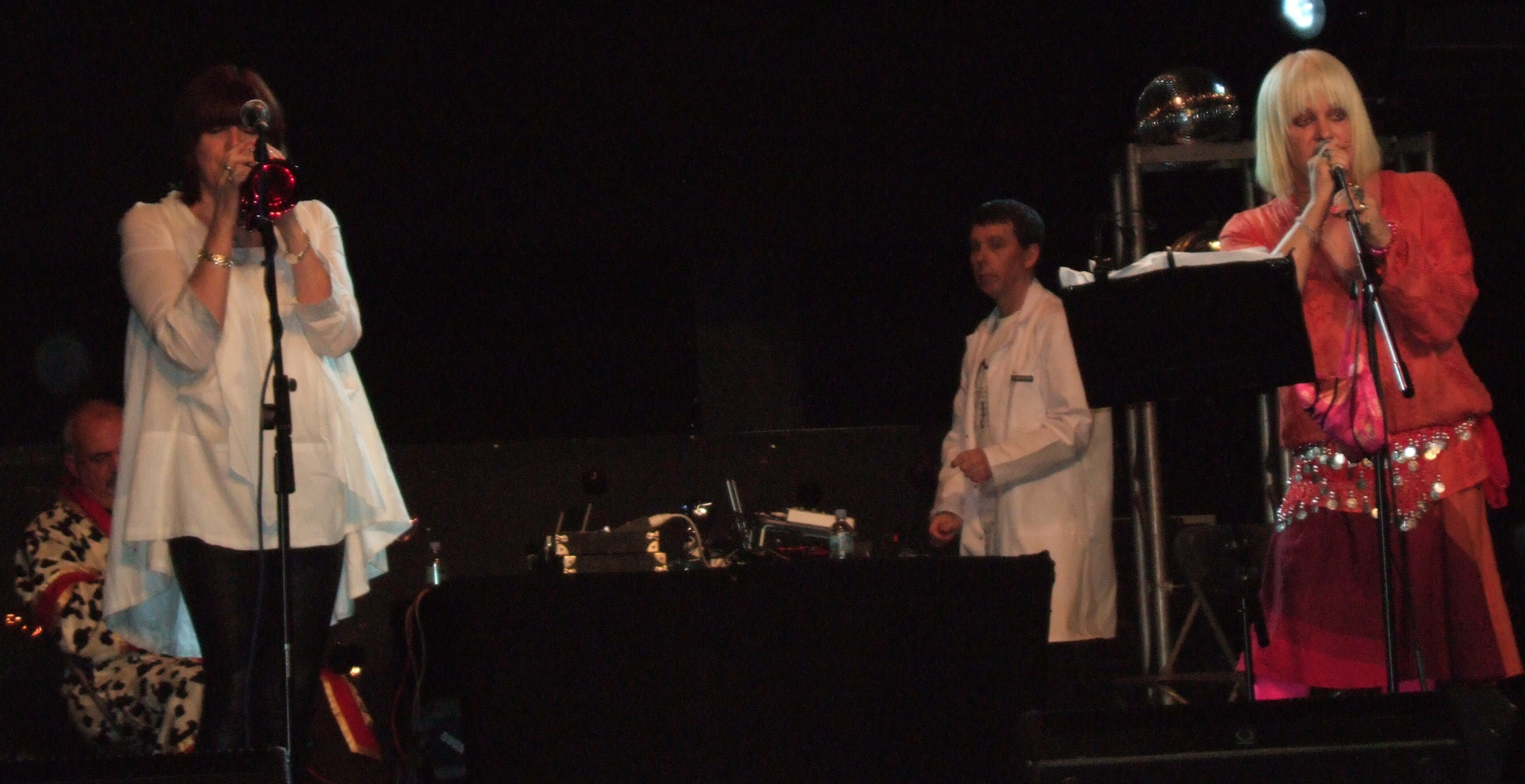 Throbbing Gristle tocando en vivo, en la ciudad de Londres. 20 de junio de 2009.